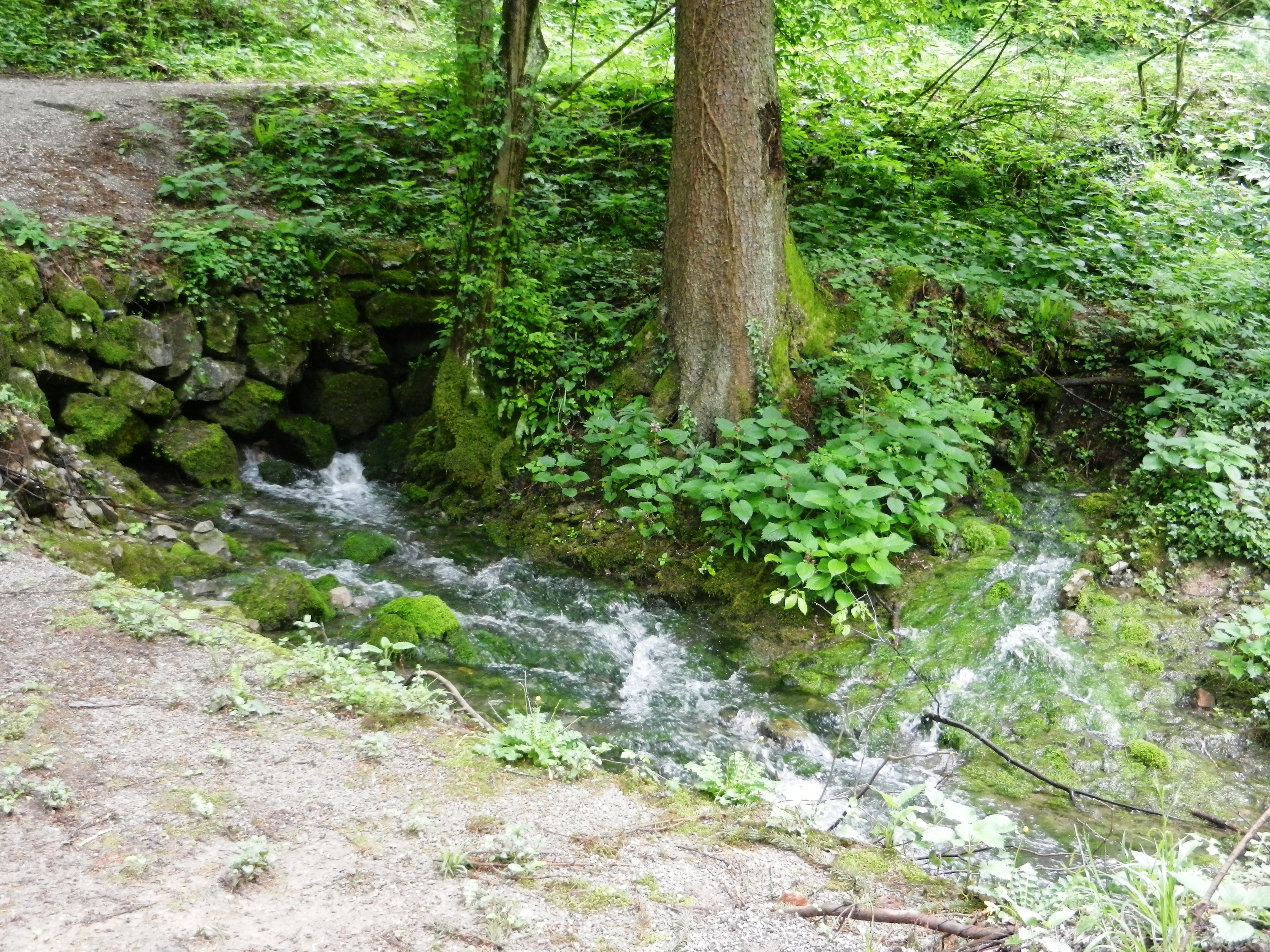 Tretji izvir izpod podornega skalovja, Veliki Močilnik, izvir Ljubljanice.